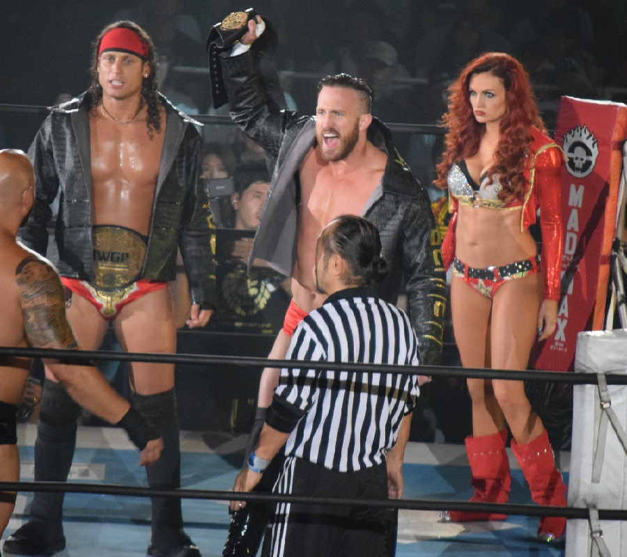 2015年7月5日 大阪城ホール 「DOMINION 7.5 in OSAKA-JO HALL」 キングダムのマット・ターバン（左）とマイケル・ベネット（中）とマリア・ケネリス（右）